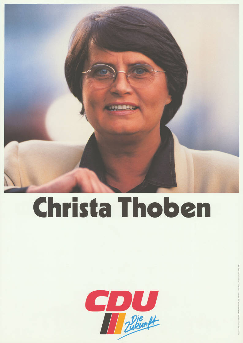 Christa Thoben CDU Die ZukunftAbbildung:PorträtfotoPlakatart:Kandidaten-/Personenplakat mit PorträtAuftraggeber:CDU-Bundesgeschäftsstelle, Hauptabteilung Öffentlichkeitsarbeit, Konrad-Adenauer-Haus, BonnDrucker_Druckart_Druckort:Greven & Bechtold GmbH, KölnObjekt-Signatur:10-031 : 886Bestand:CDU-Plakate (10-031)GliederungBestand10-18:PersonenplakateLizenz:KAS/ACDP 10-031 : 886 CC-BY-SA 3.0 DE